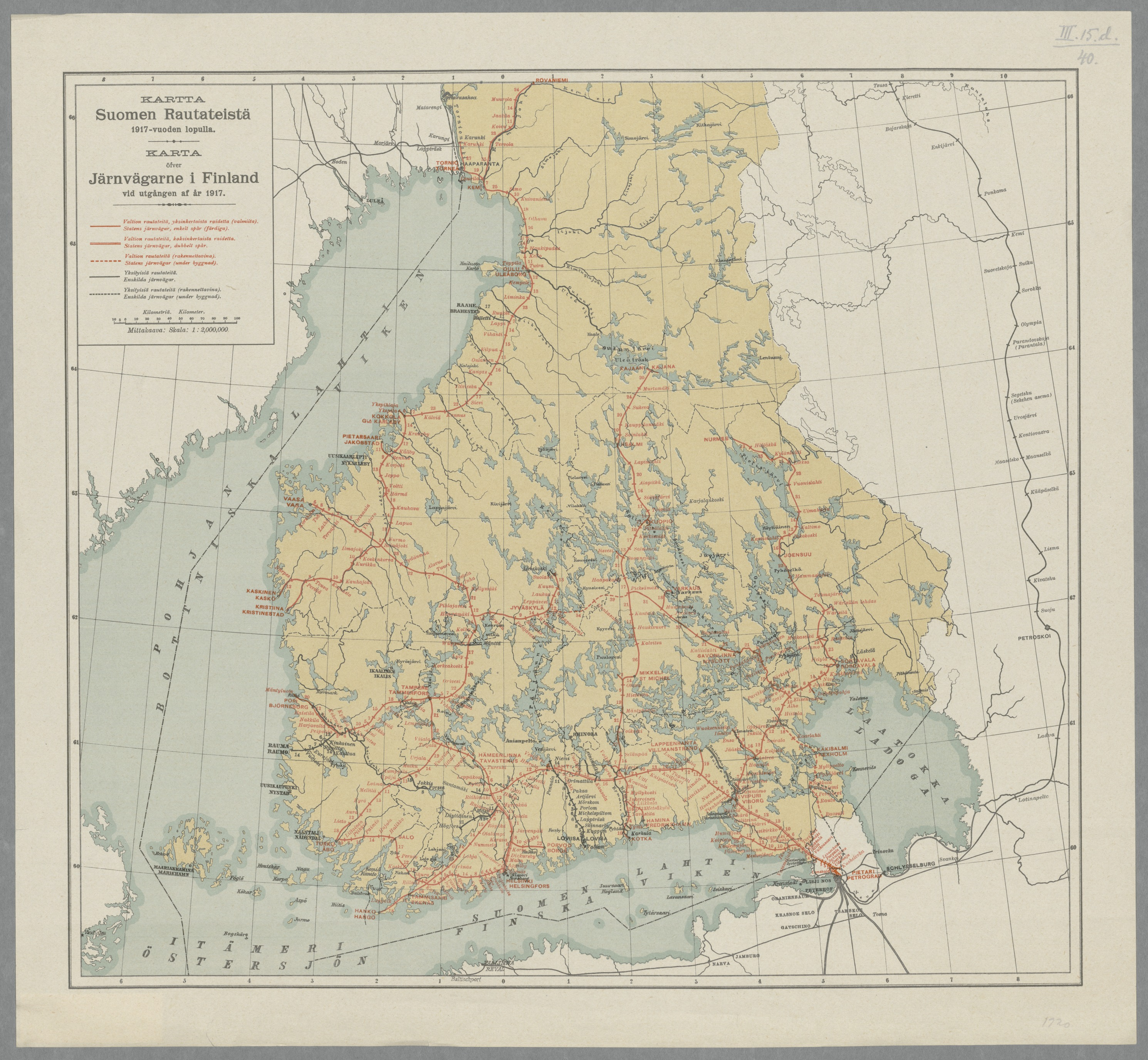 Kartta Suomen rautateistä vuoden 1917 lopulla